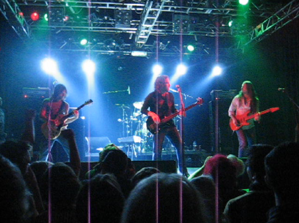 Winger Nosturissa 15.10.2006